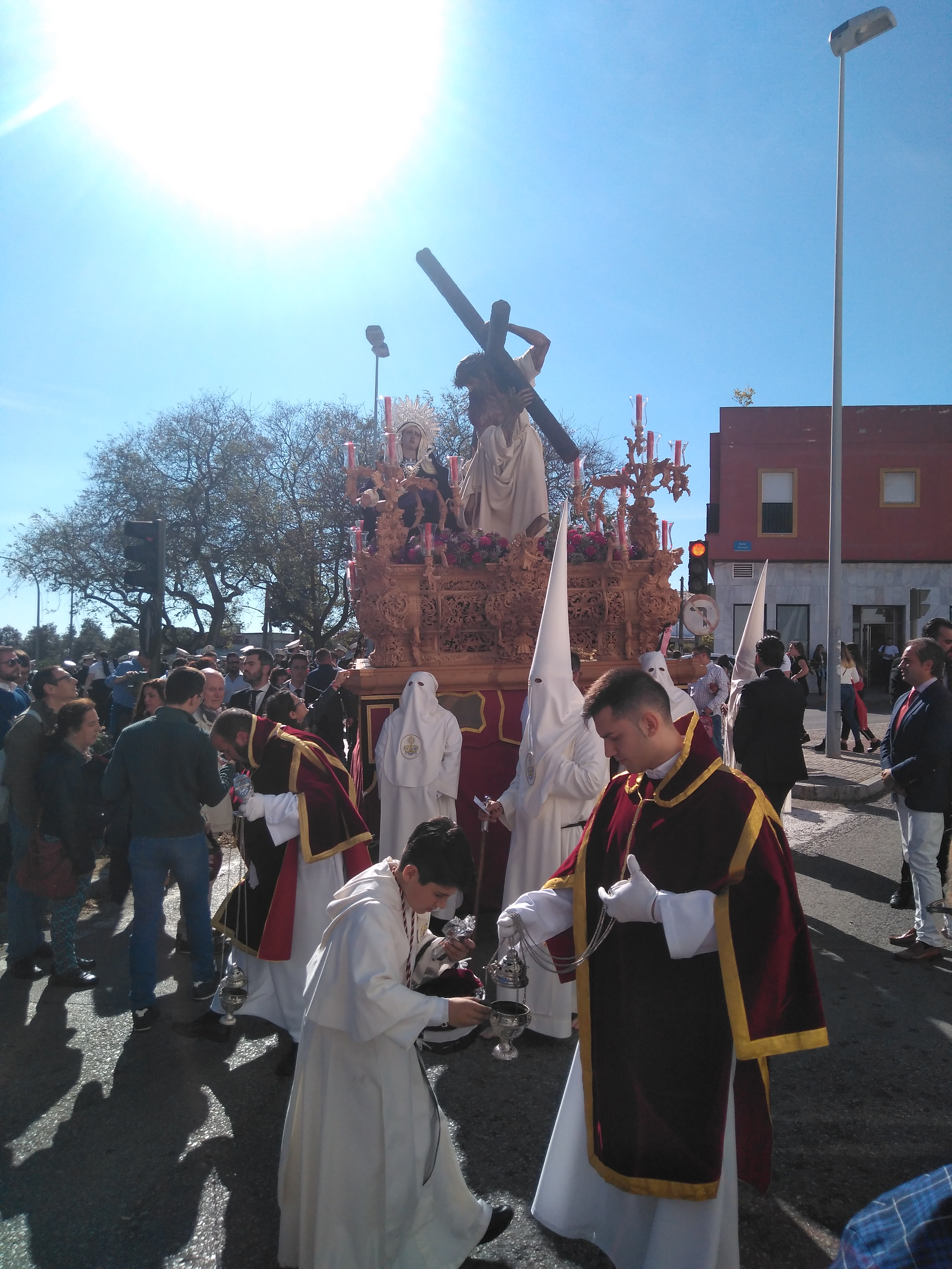 Hermandad de la Misión (Jerez de la Frontera, España)